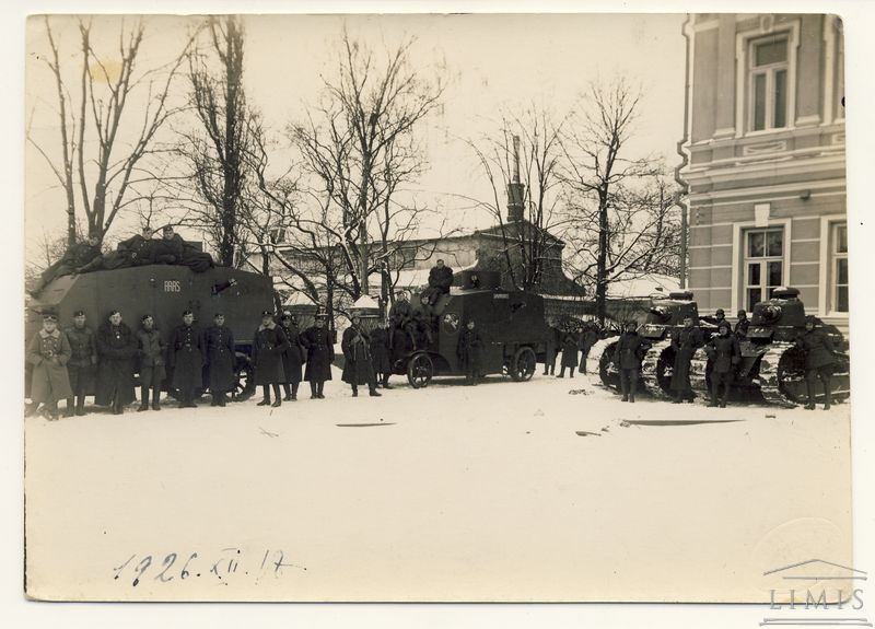 Lietuvos šarvuočių rinktinės „Ehrhardt/Daimler Behelftswagen“ šarvuočiai bei lengvieji tankai Renault FT-17, Kaunas.